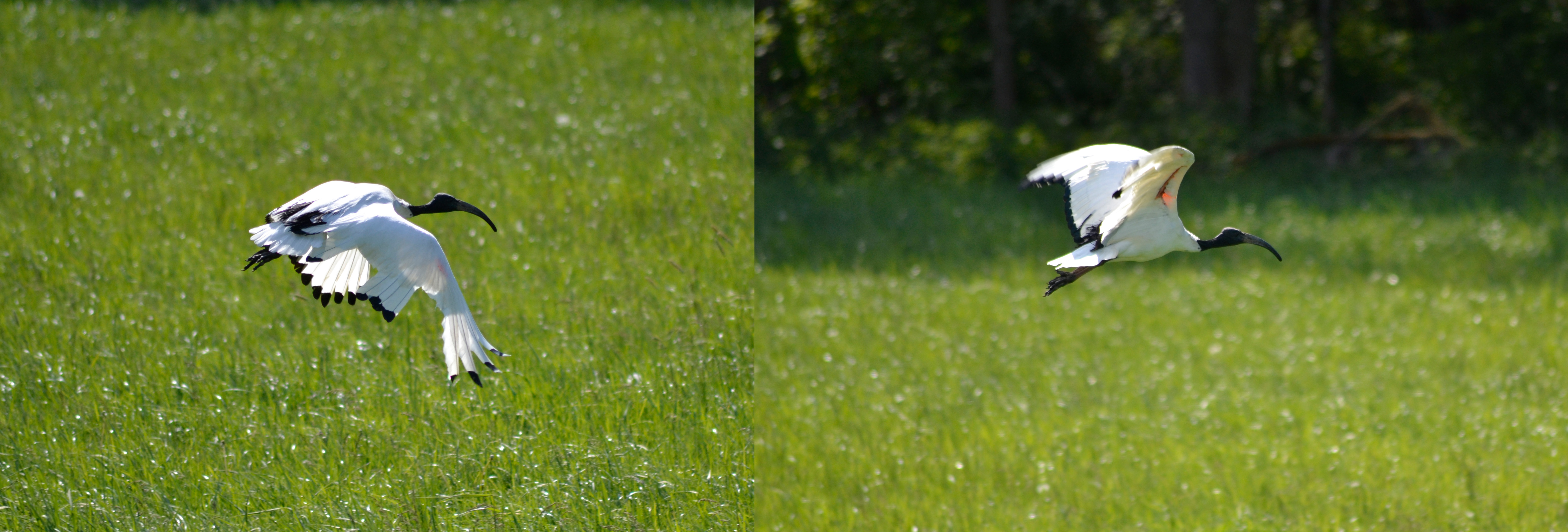 Bewegung eines Ibis während des Flugs nach dem Starten vom Boden. Das Bild wurde von mir in Attendorn am 14.05.2020 aufgenommen.